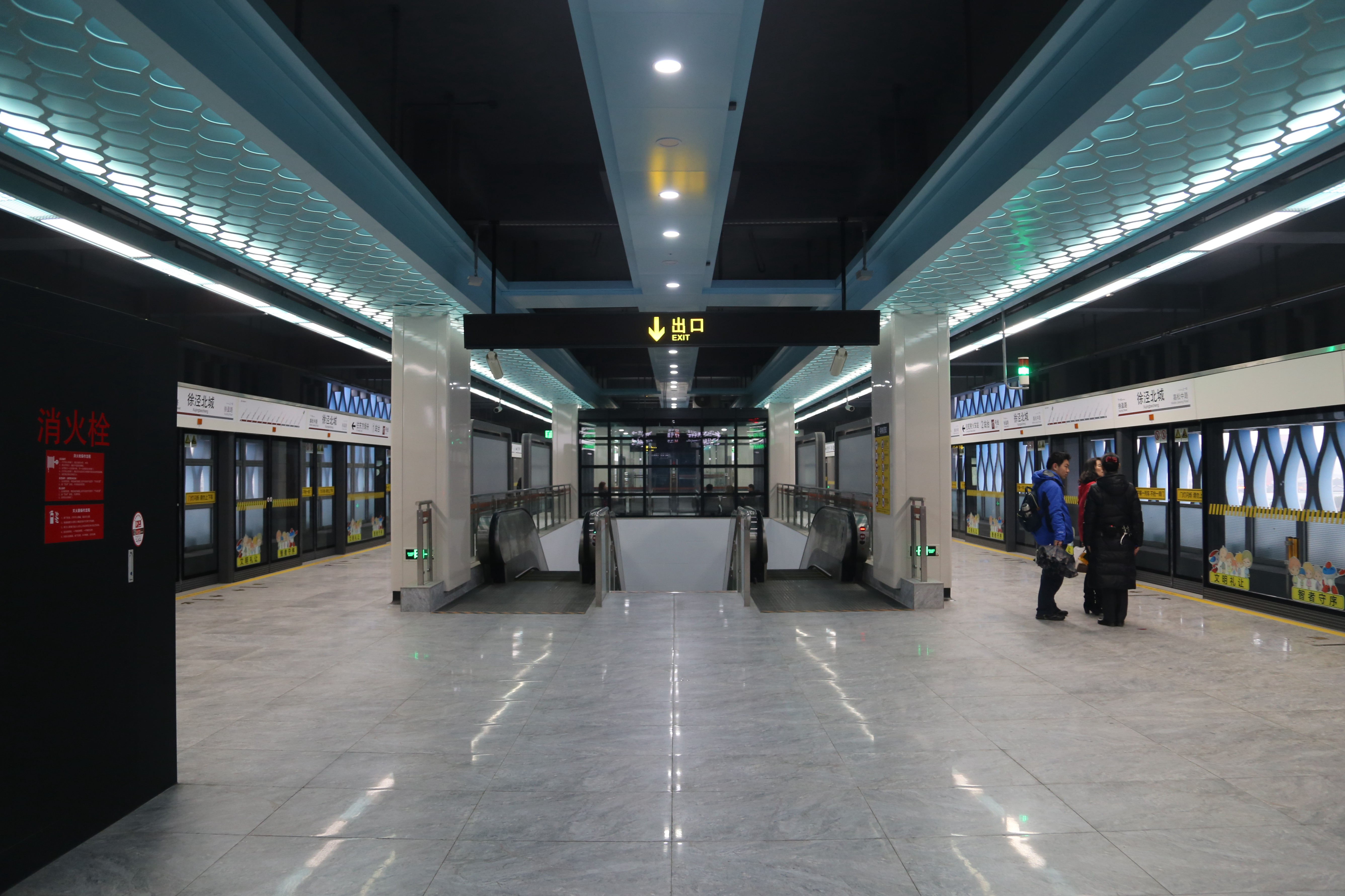 徐泾北城站站台